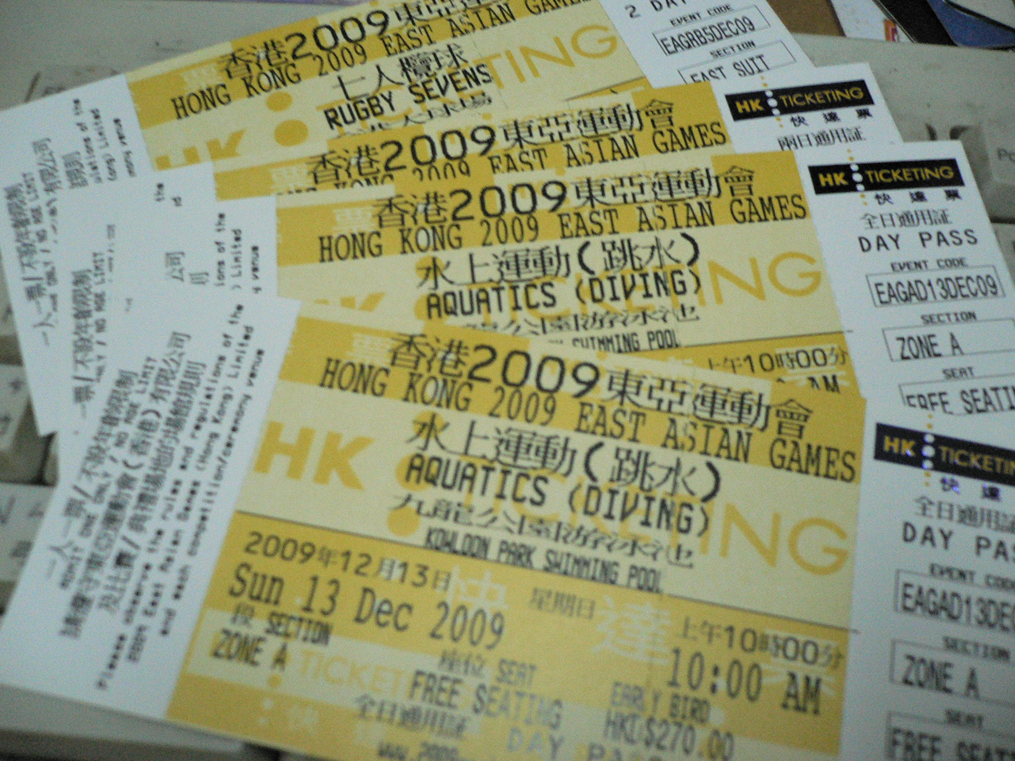 中文（香港）: 快達票售出的2009年東亞運動會賽事門票4張。